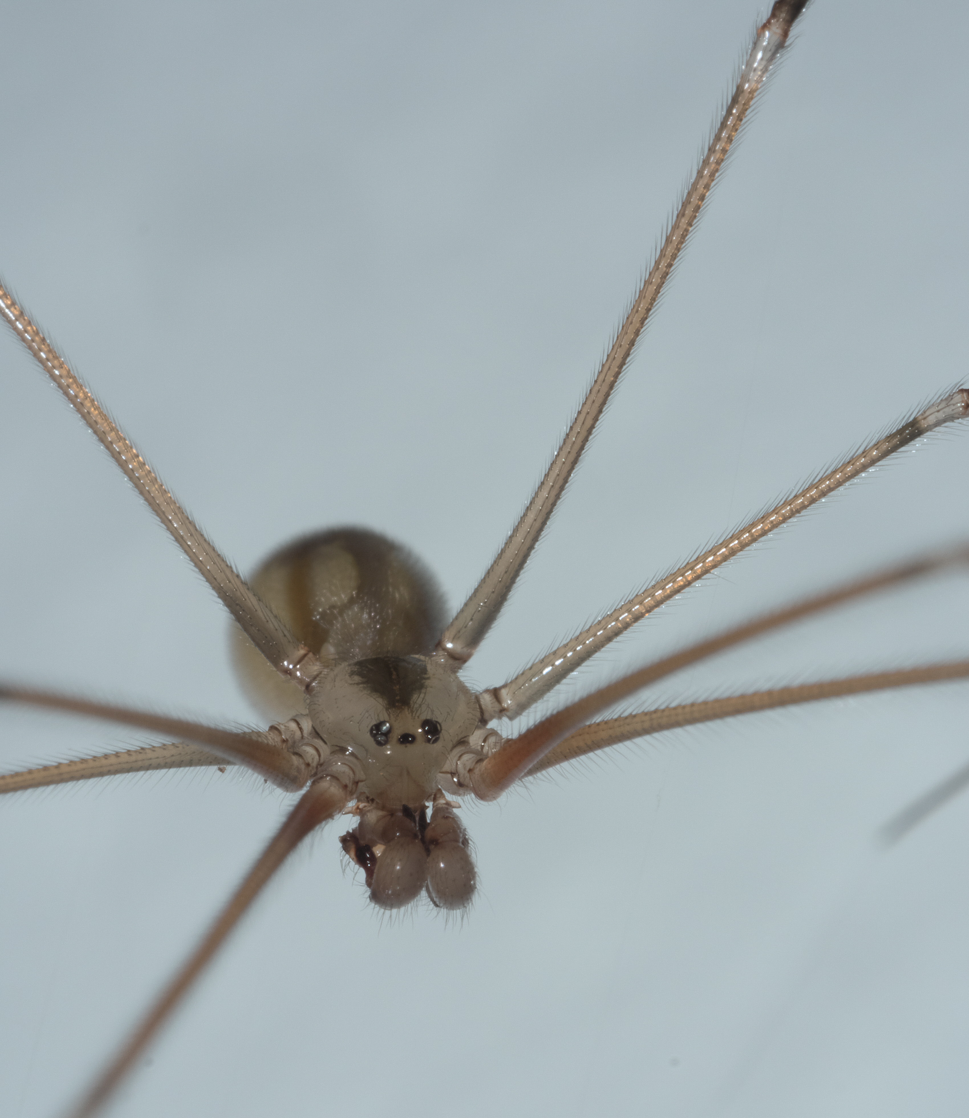 Pholcidae, cellar spiders